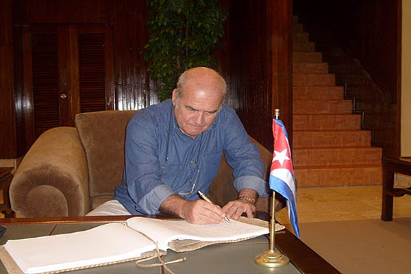 Ivan Martins Pinheiro (Rio de Janeiro, 18 de março de 1946) é um importante dirigente comunista brasileiro, atual Secretário-Geral do Partido Comunista Brasileiro - PCB e candidato à Presidência da República em 2010, pelo partido.